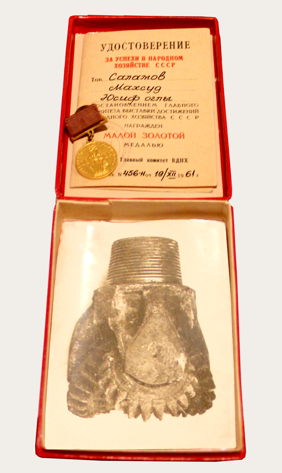 electric rotation downhole motor / электробур